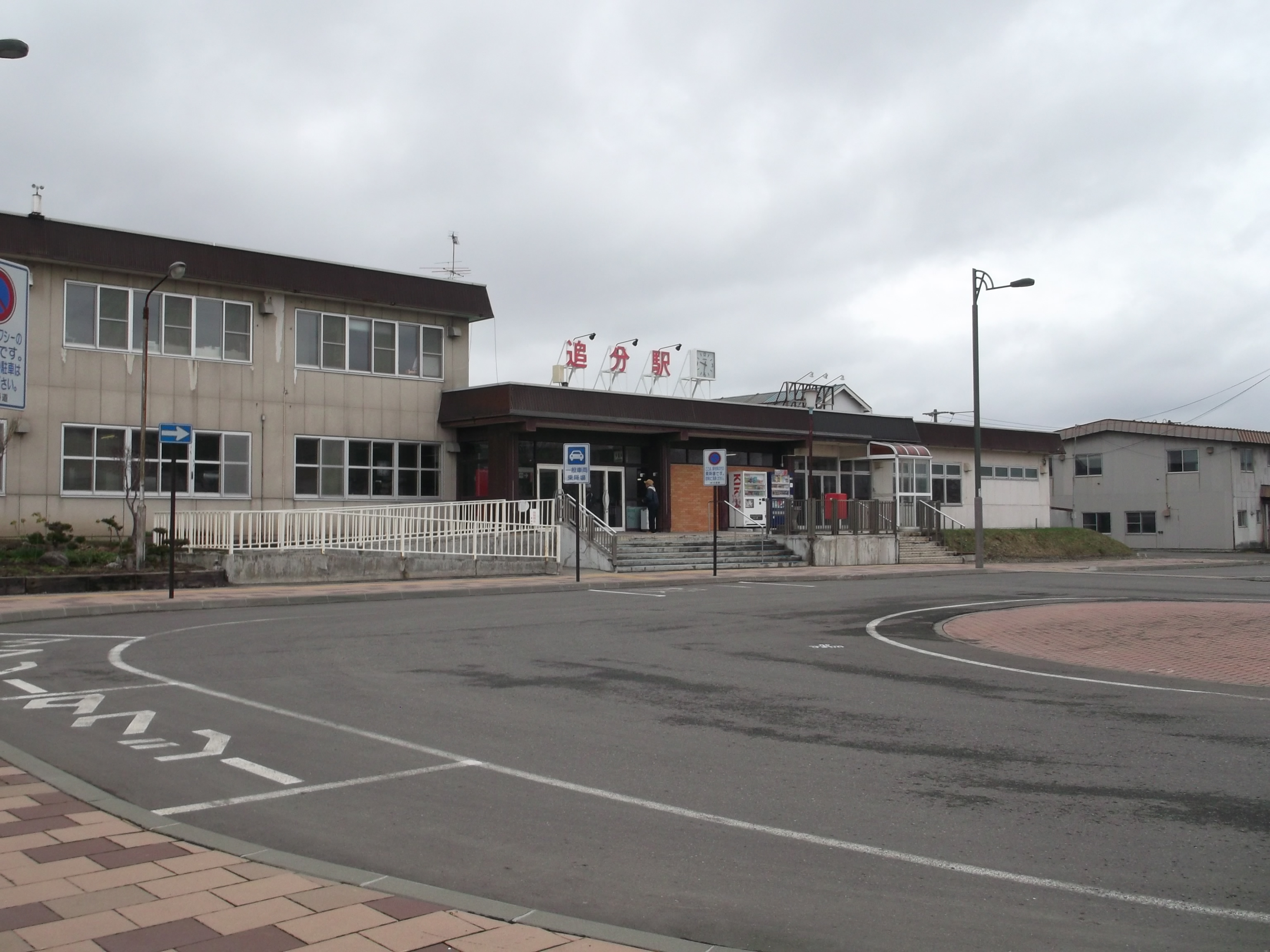 JR北海道追分駅 駅舎